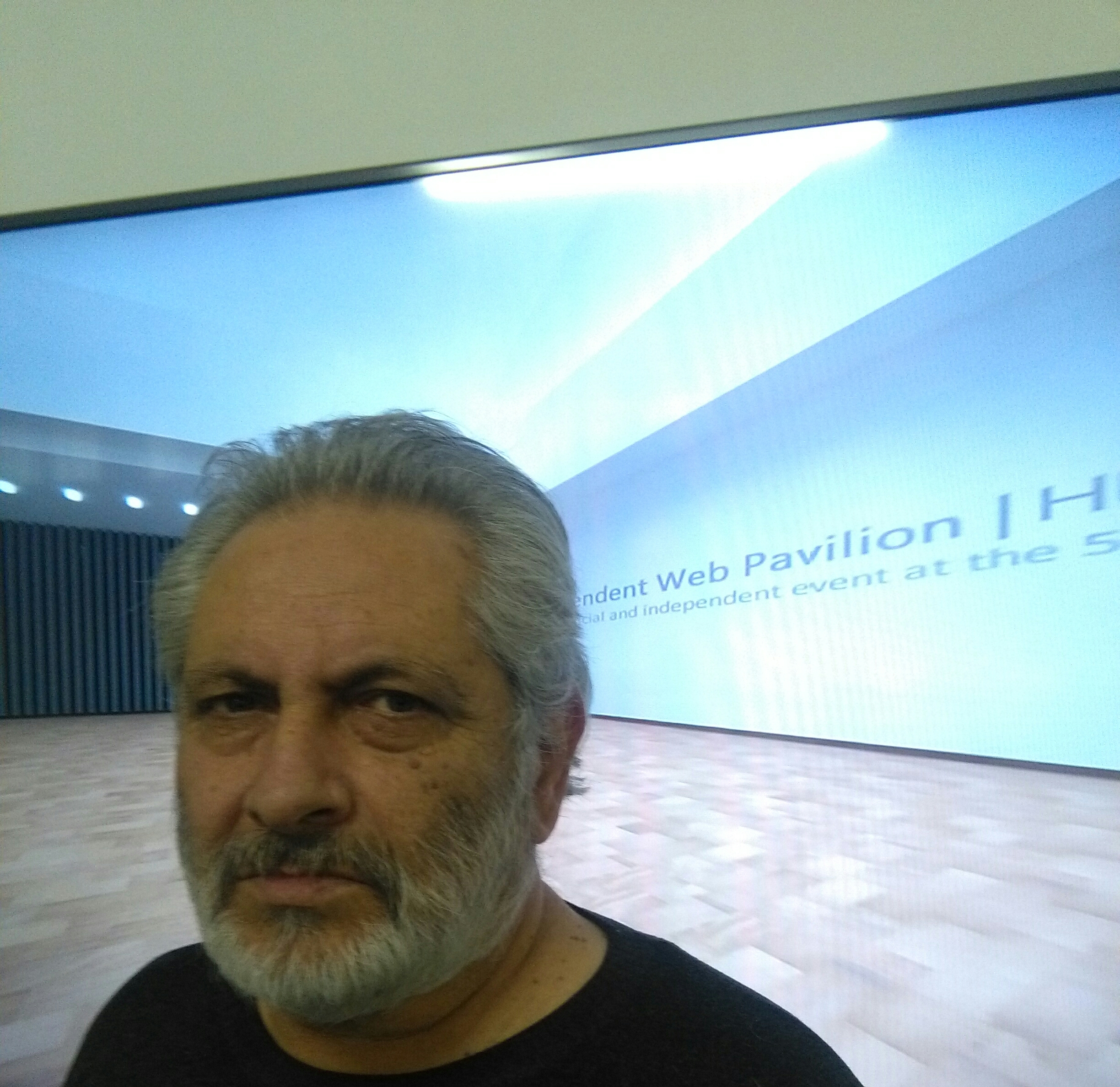 Angelo Marino